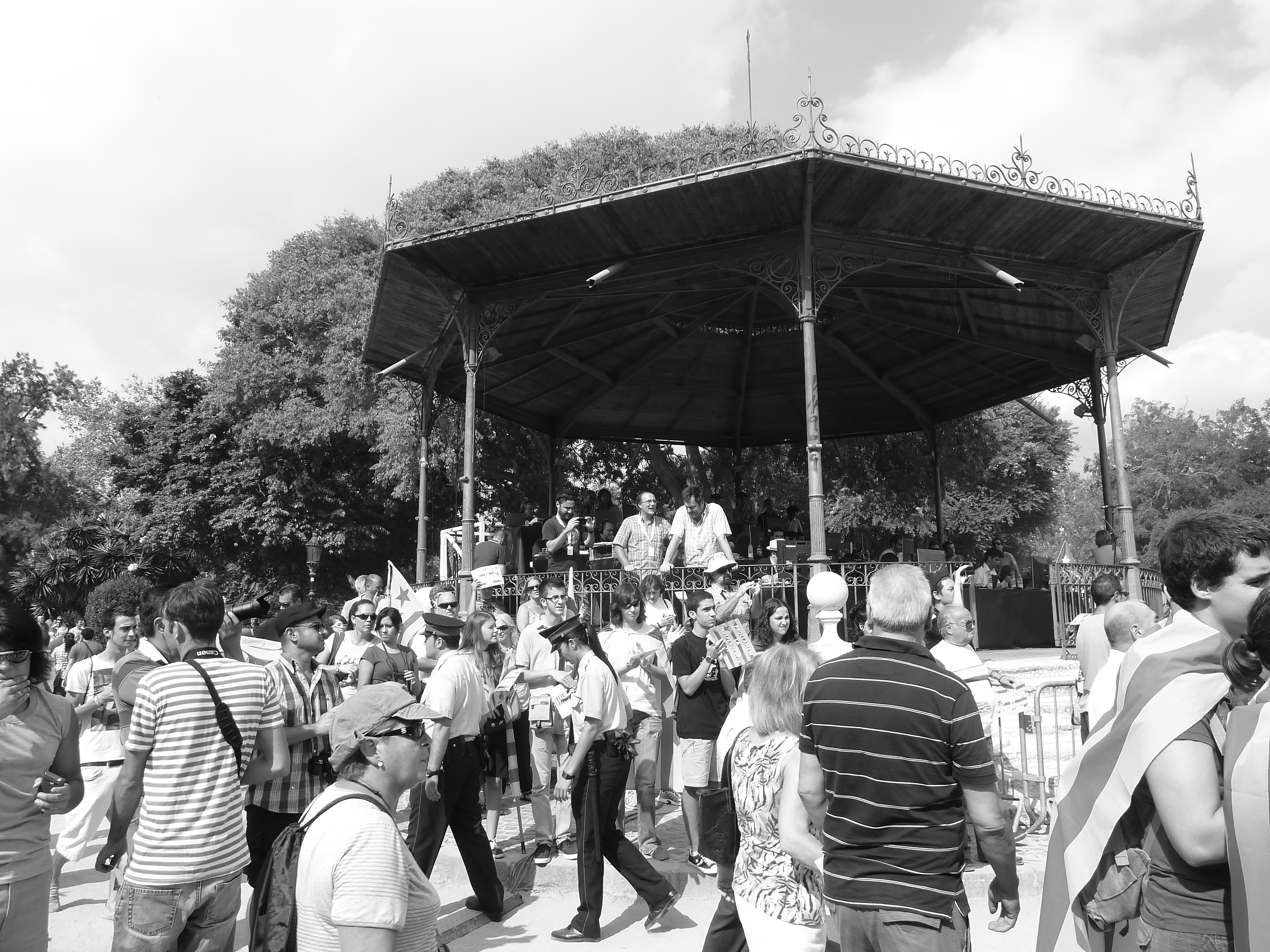 Barcelona